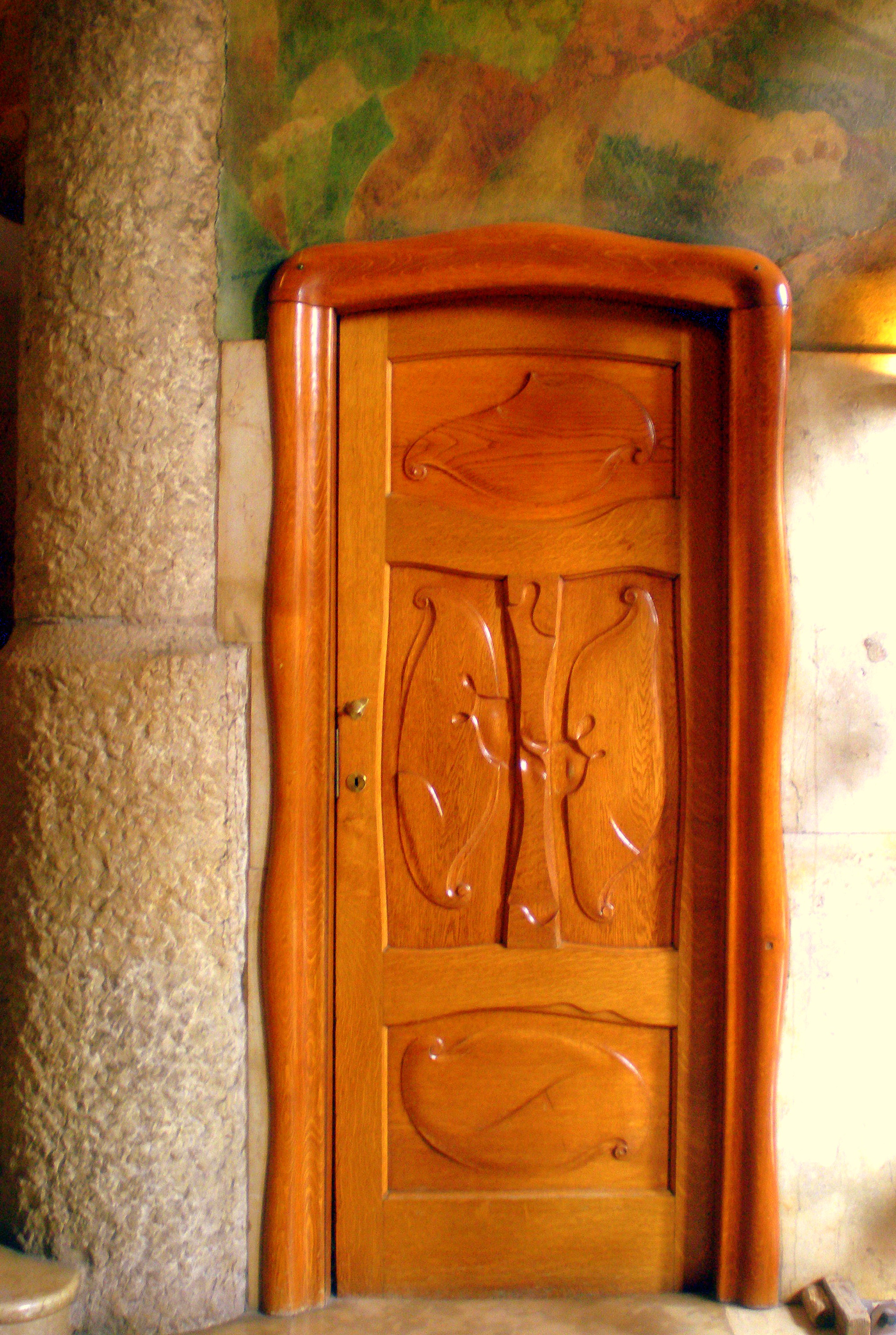 Barcelona - La Pedrera. Porta a l´entrada pel carrer Provença